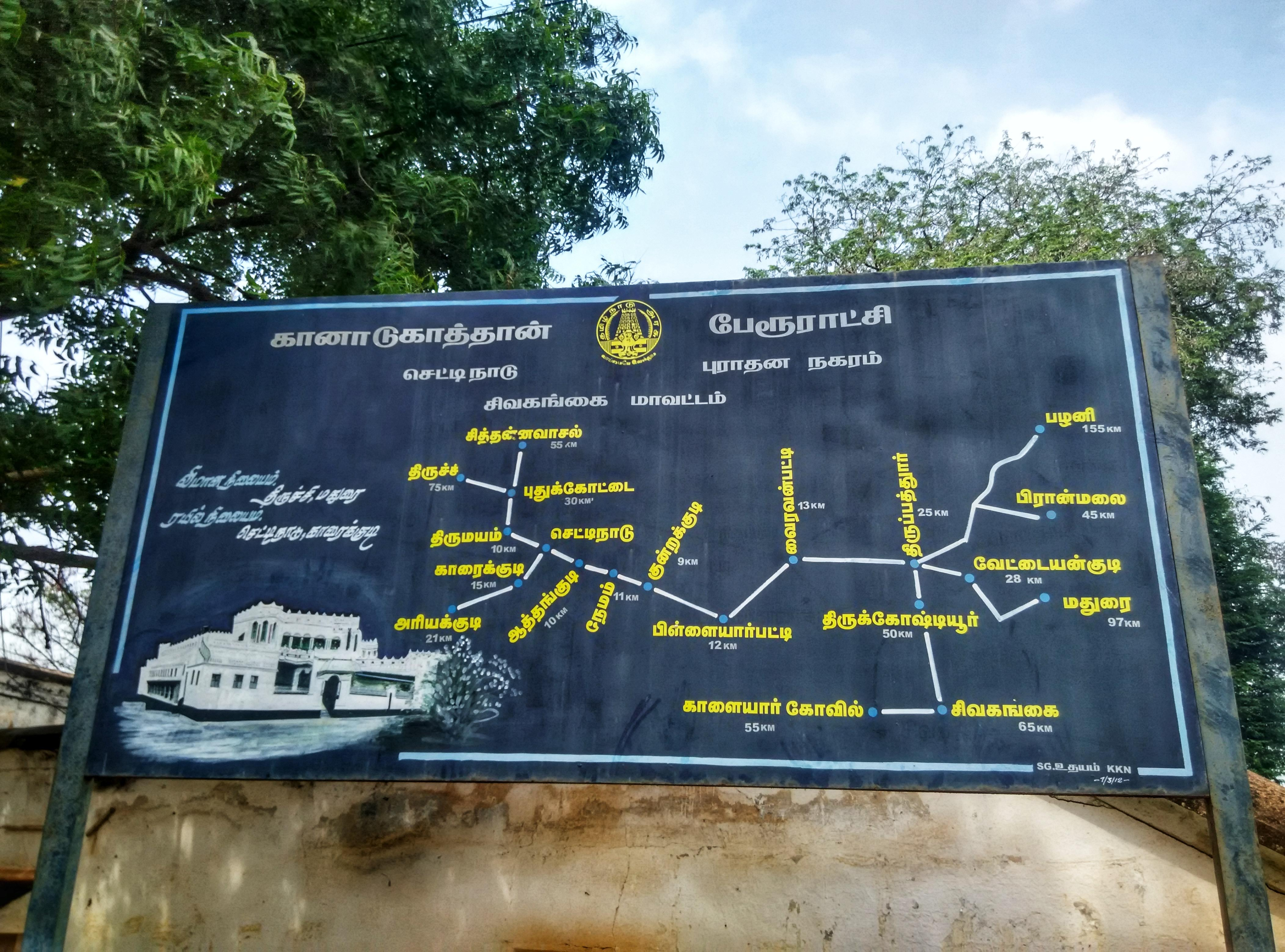 கானாடுகாத்தன் பேரூராட்சியின் விளக்கப்படம்